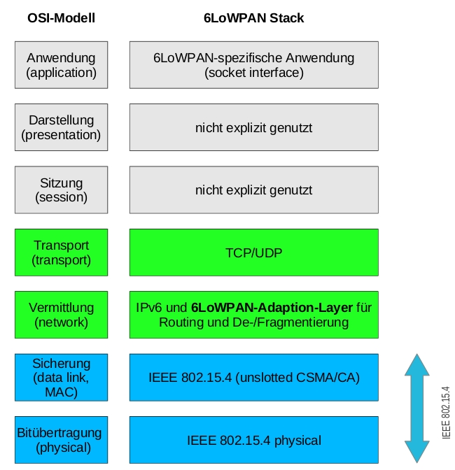 6LoWPAN in OSI model